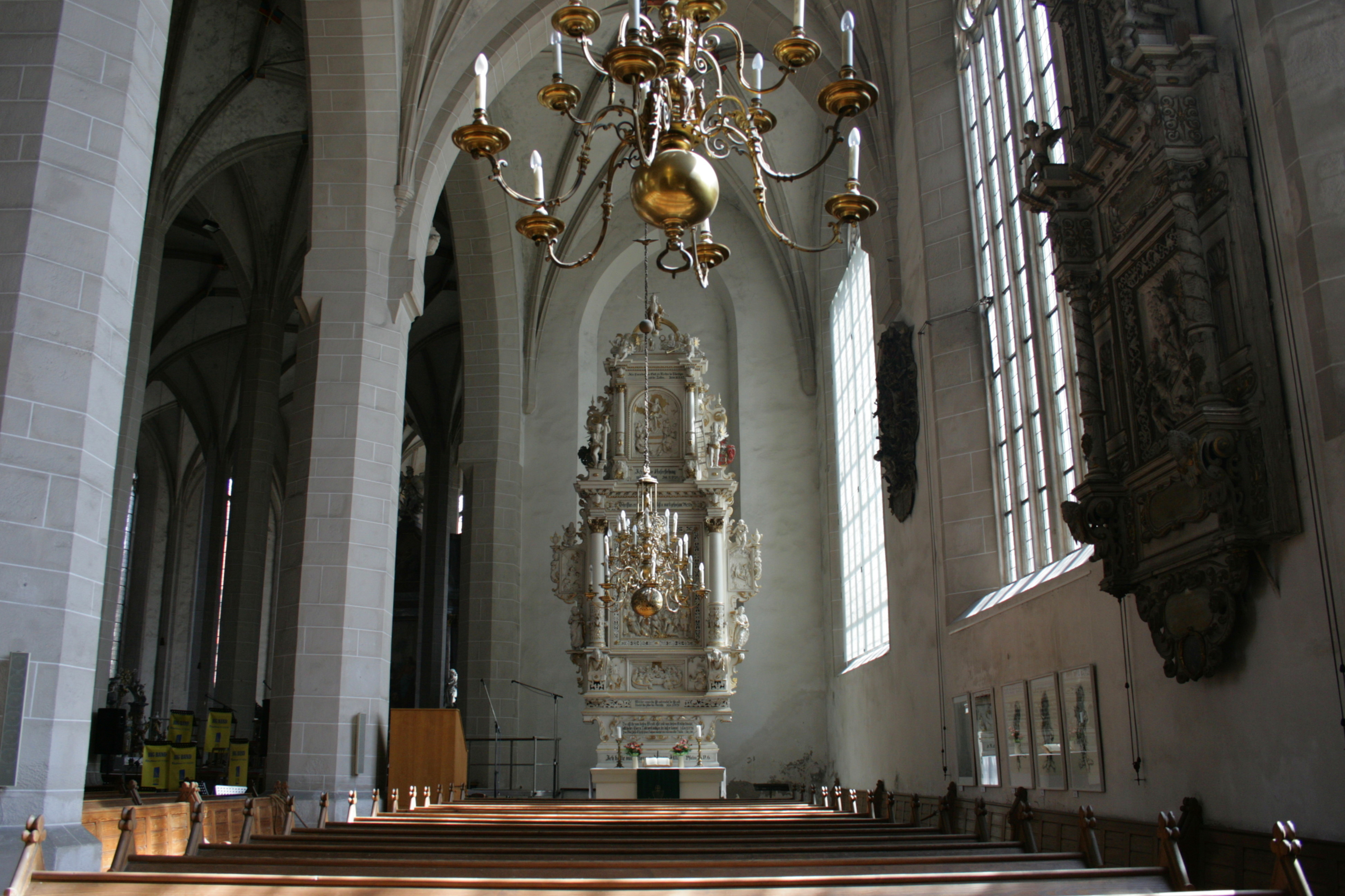 Dom St. Petri in Bautzen, evangelischer Teil Hornjoserbsce: Tachantska cyrkej swj. Pětra w Budyšinje; ewangelski dźěl.